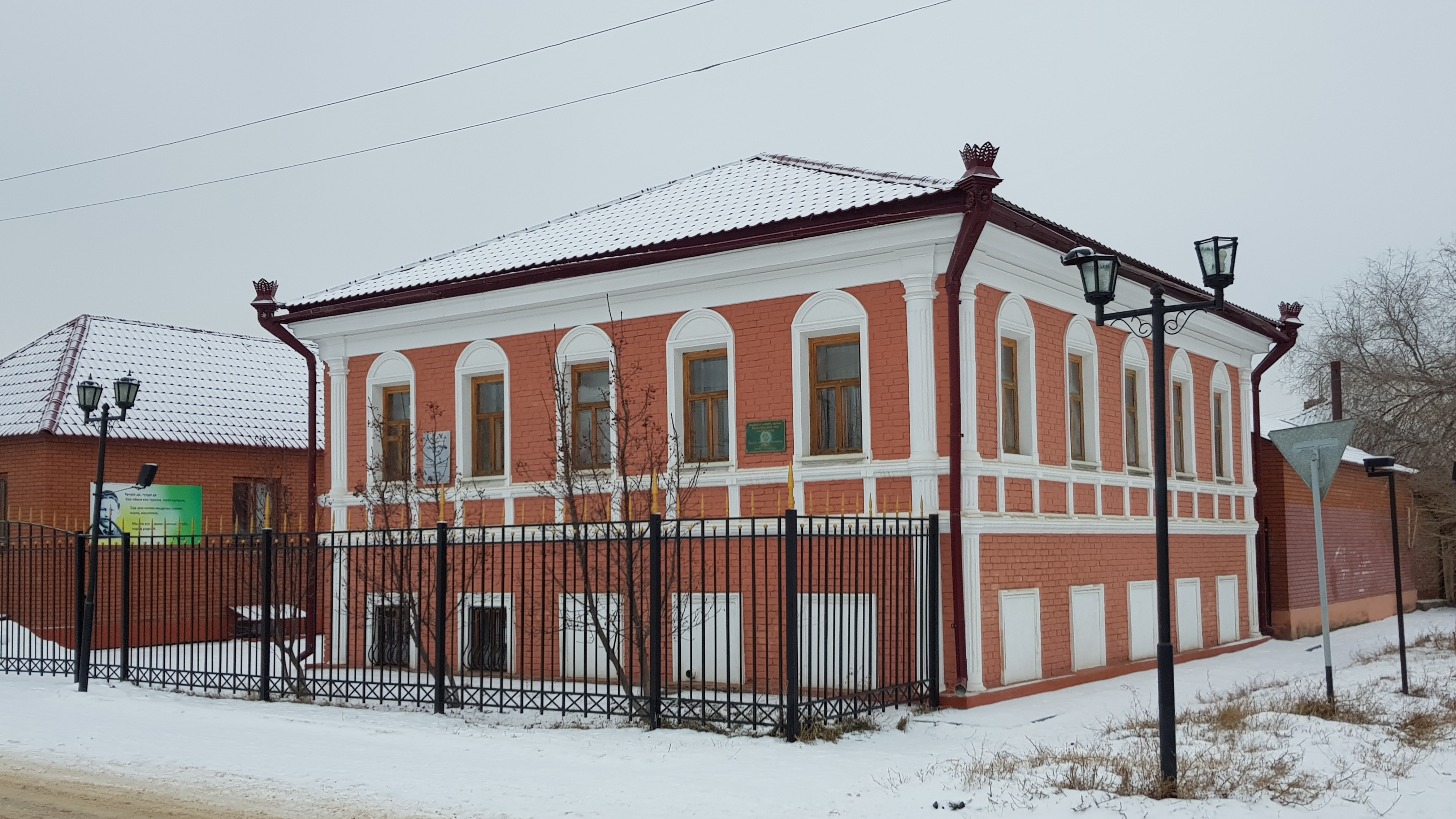 Дом принадлежал семье Тухватуллиных, оказавшей большое влияние на Габдуллу Тукая, классика татарской литературы. В настоящее время в здании располагается музей Г. Тукая.